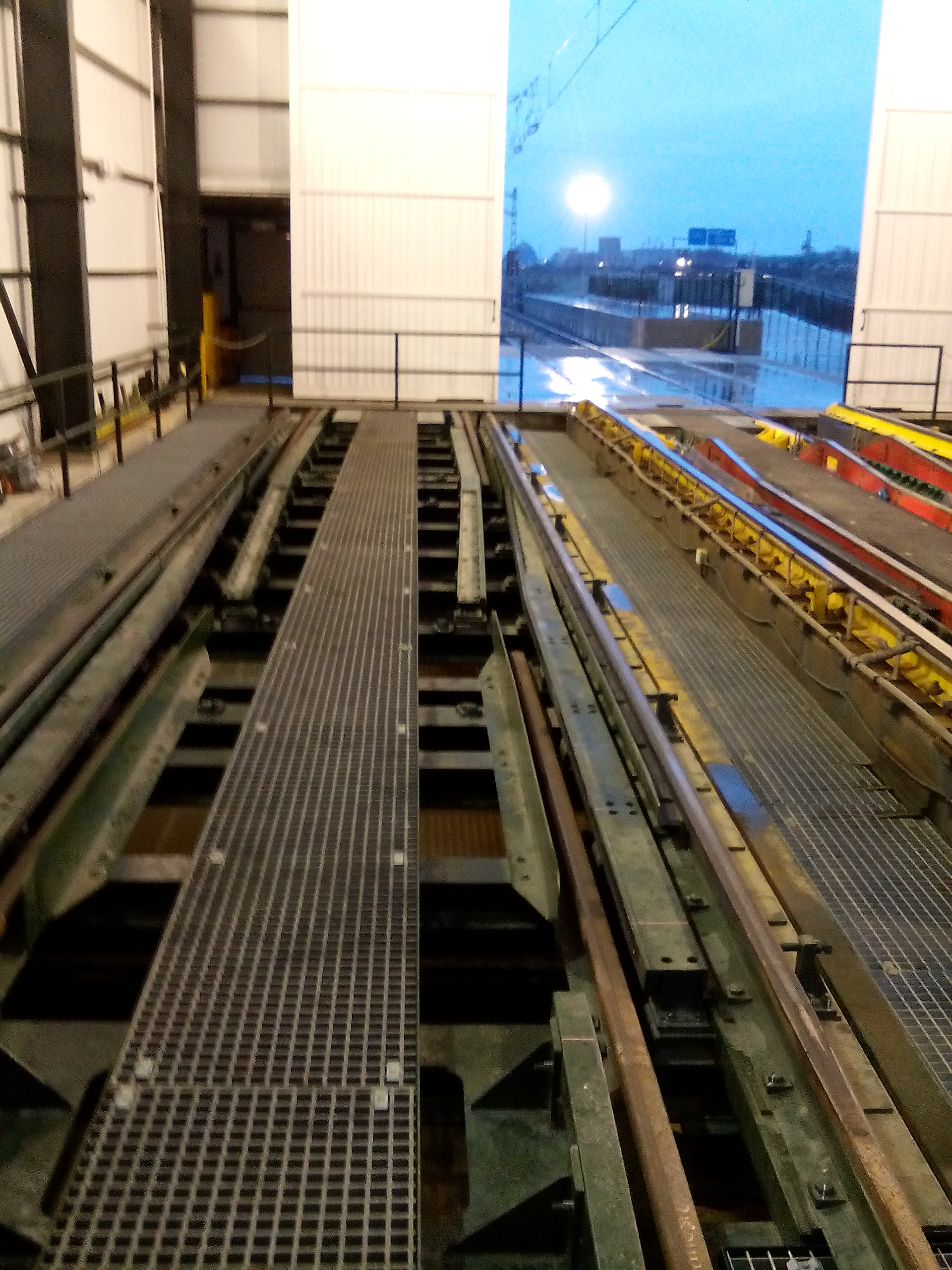 Vista de la mesa CAF dentro de un cambiador TCRS2 en posición Talgo